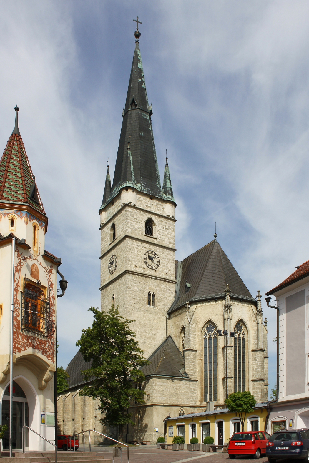 Die röm.-kath. Pfarrkirche in der Stadt Haag, Niederösterreich.